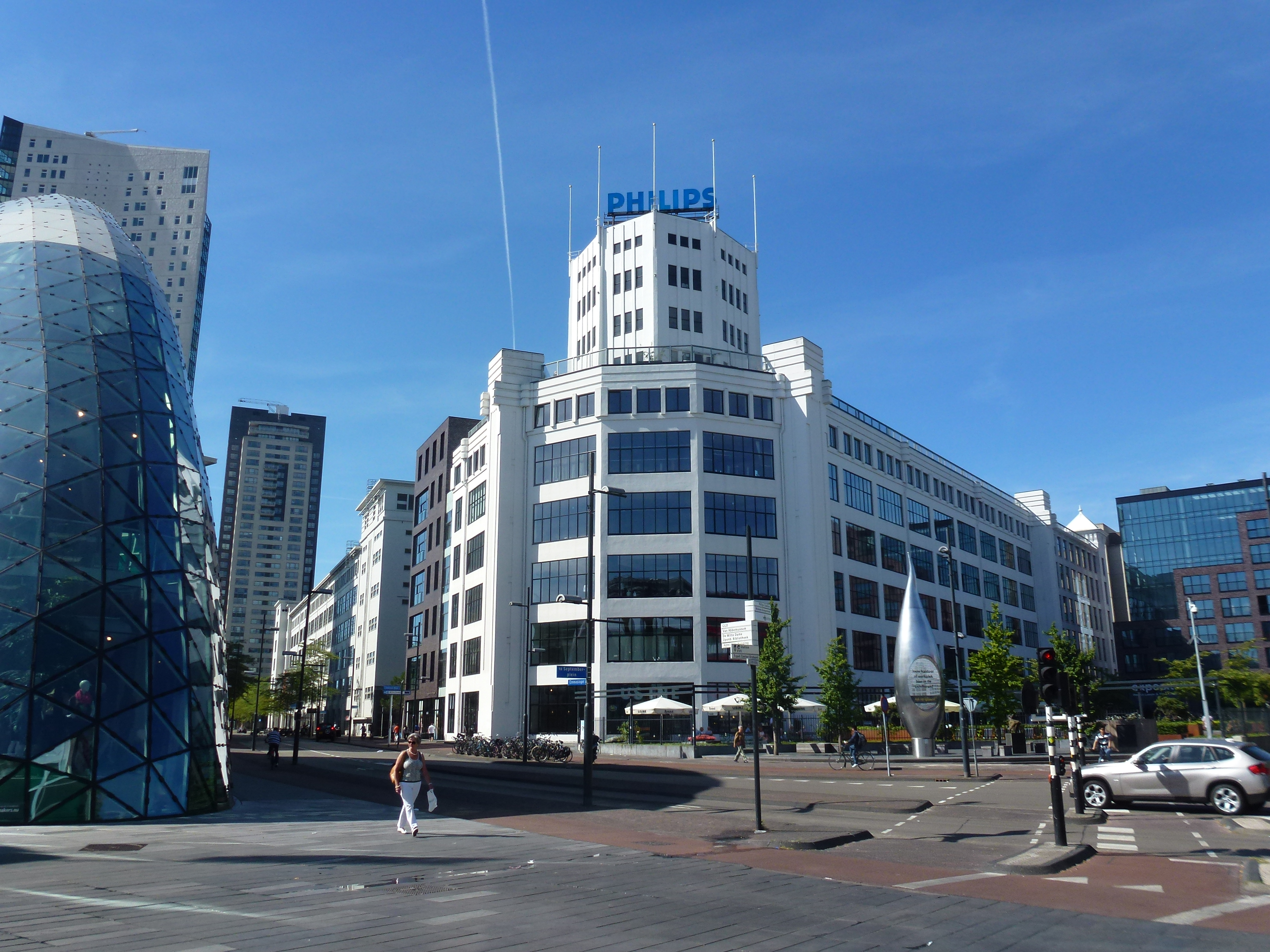 Lichttoren Eindhoven